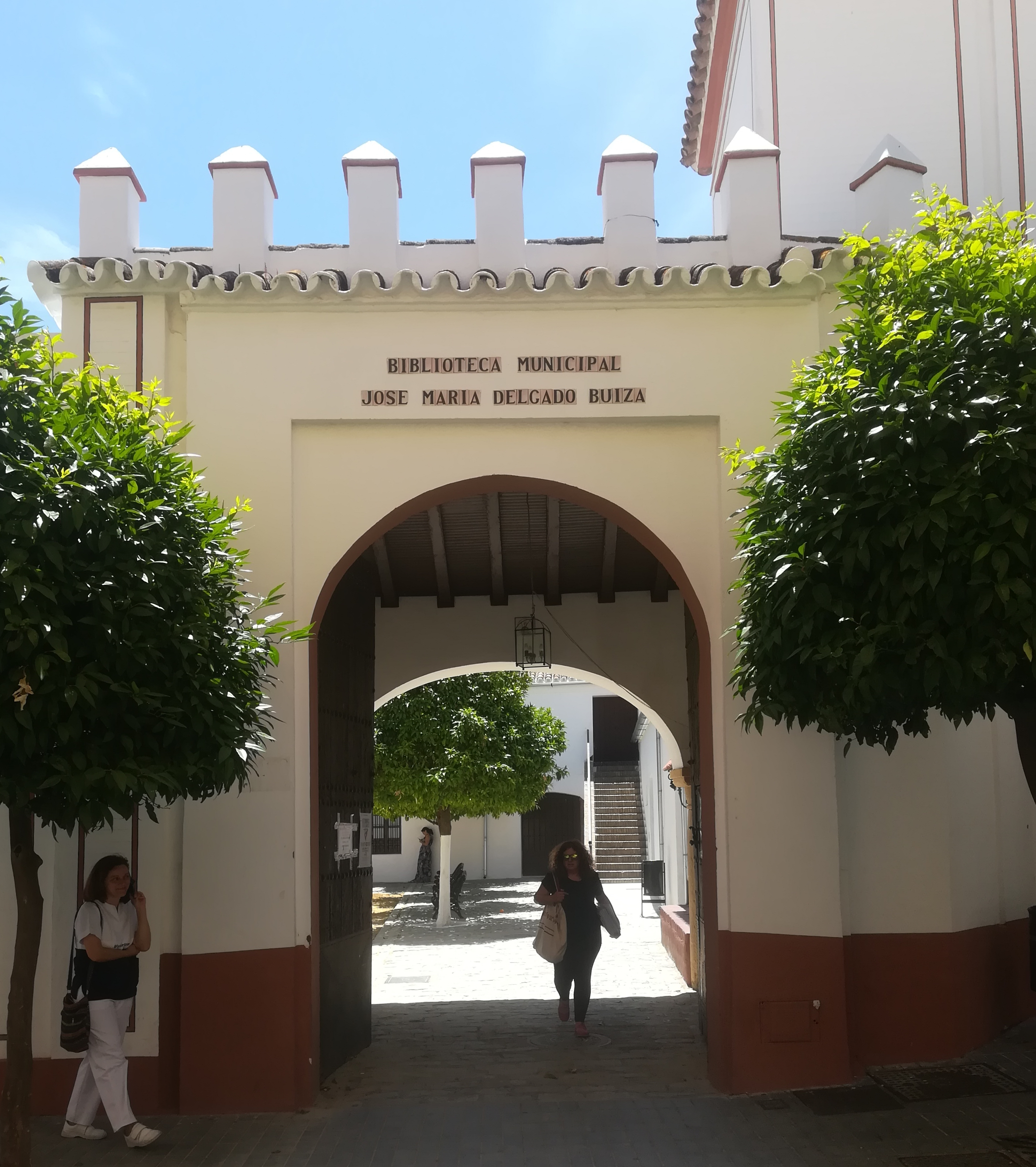 Hacienda Montefuerte. Tomares, provincia de Sevilla, Andalucía, España.